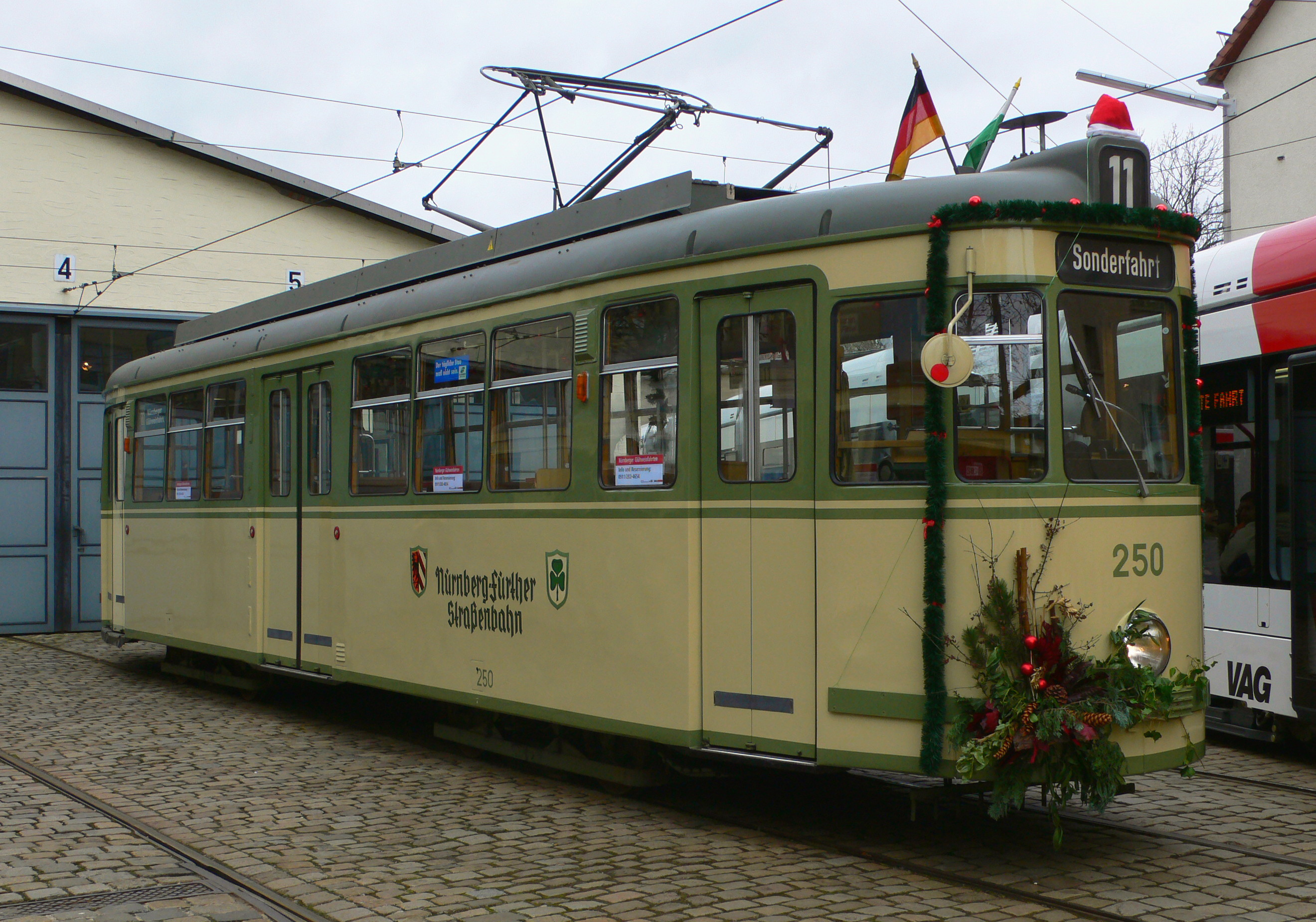 Triebwagen 250 (Typ T4) der VAG Verkehrs-Aktiengesellschaft Nürnberg (VAG)